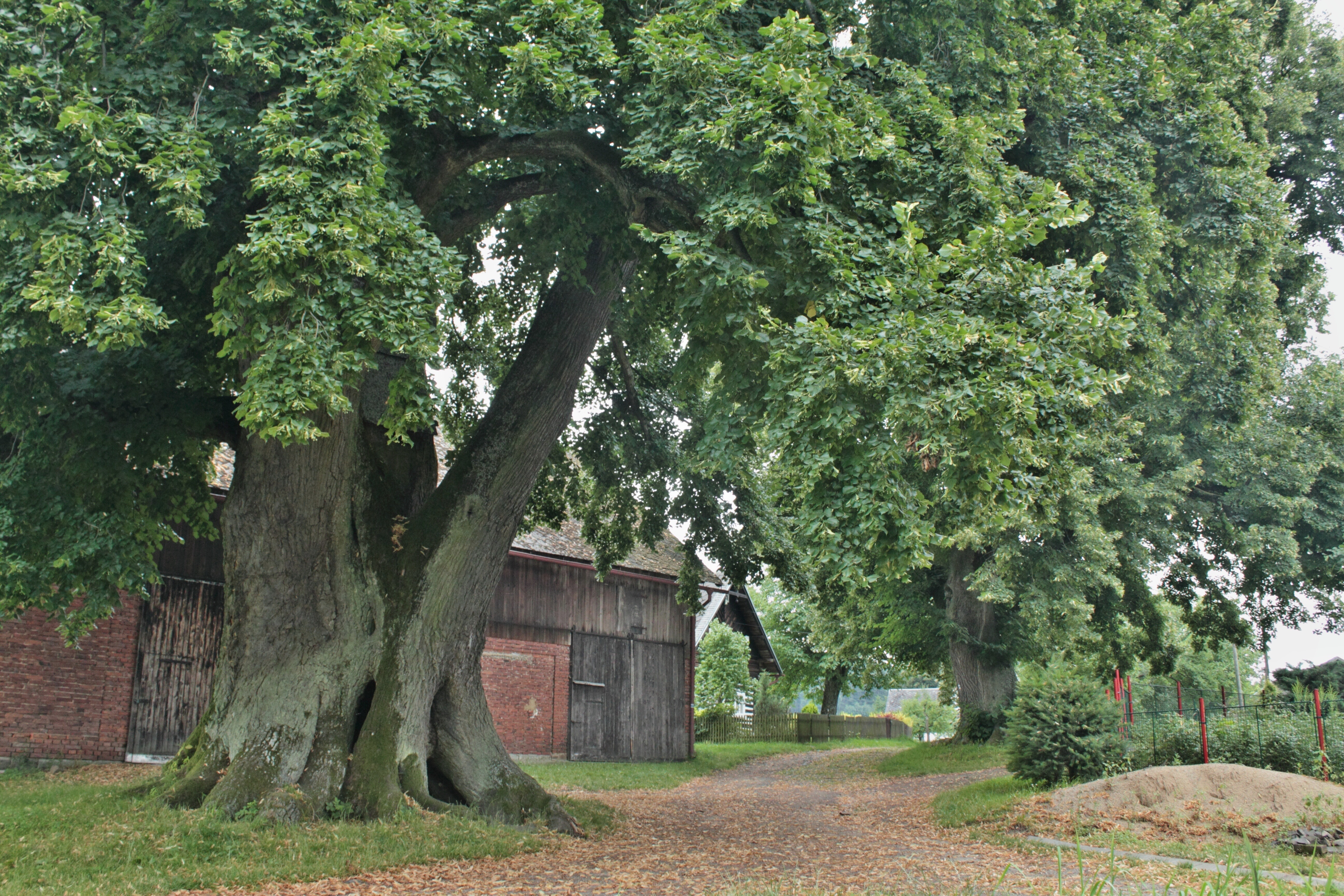 Kotelské lípy